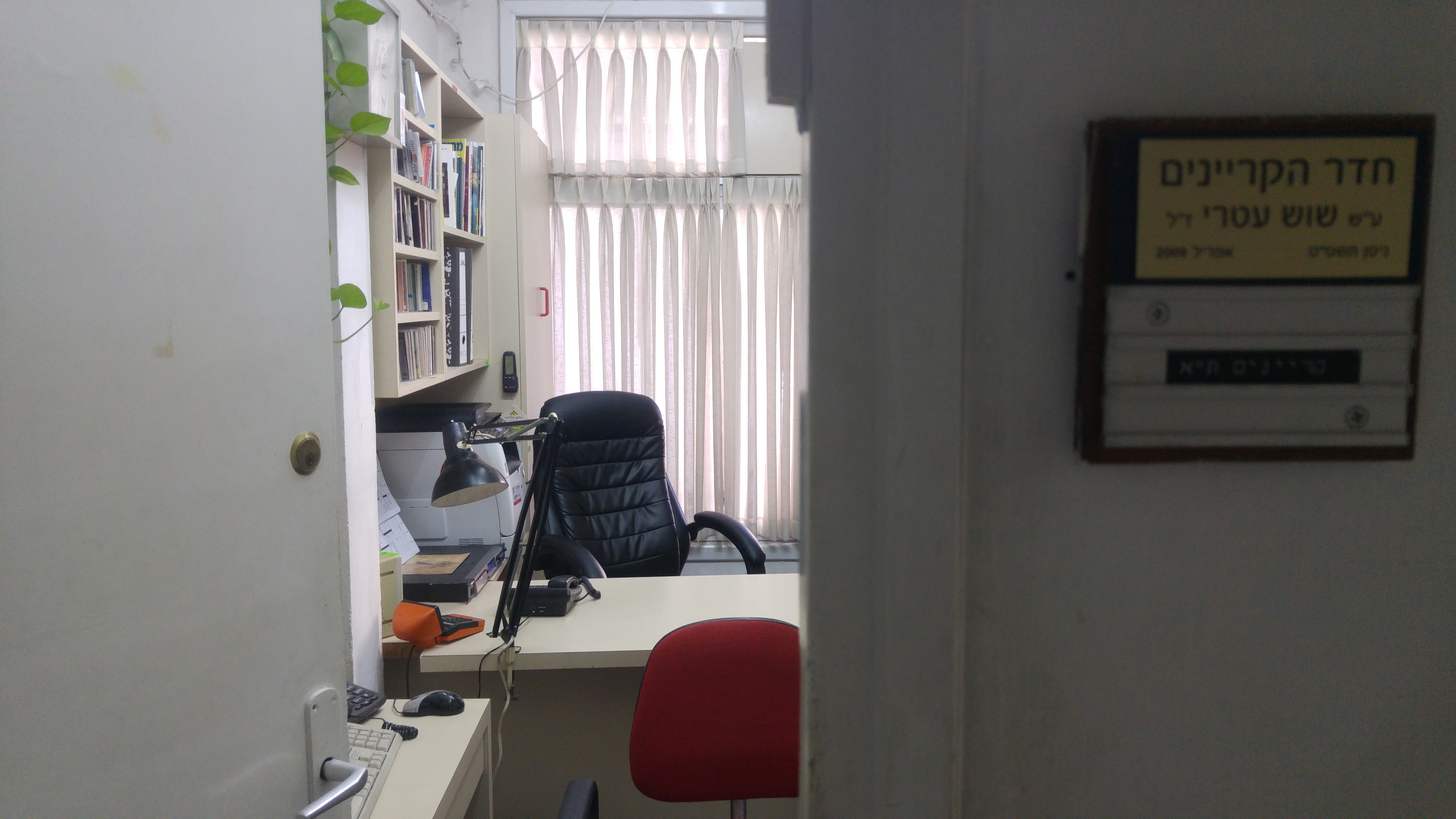 מתחם רשות השידור בתל אביב, ליד הקריה ומתחם שרונה.